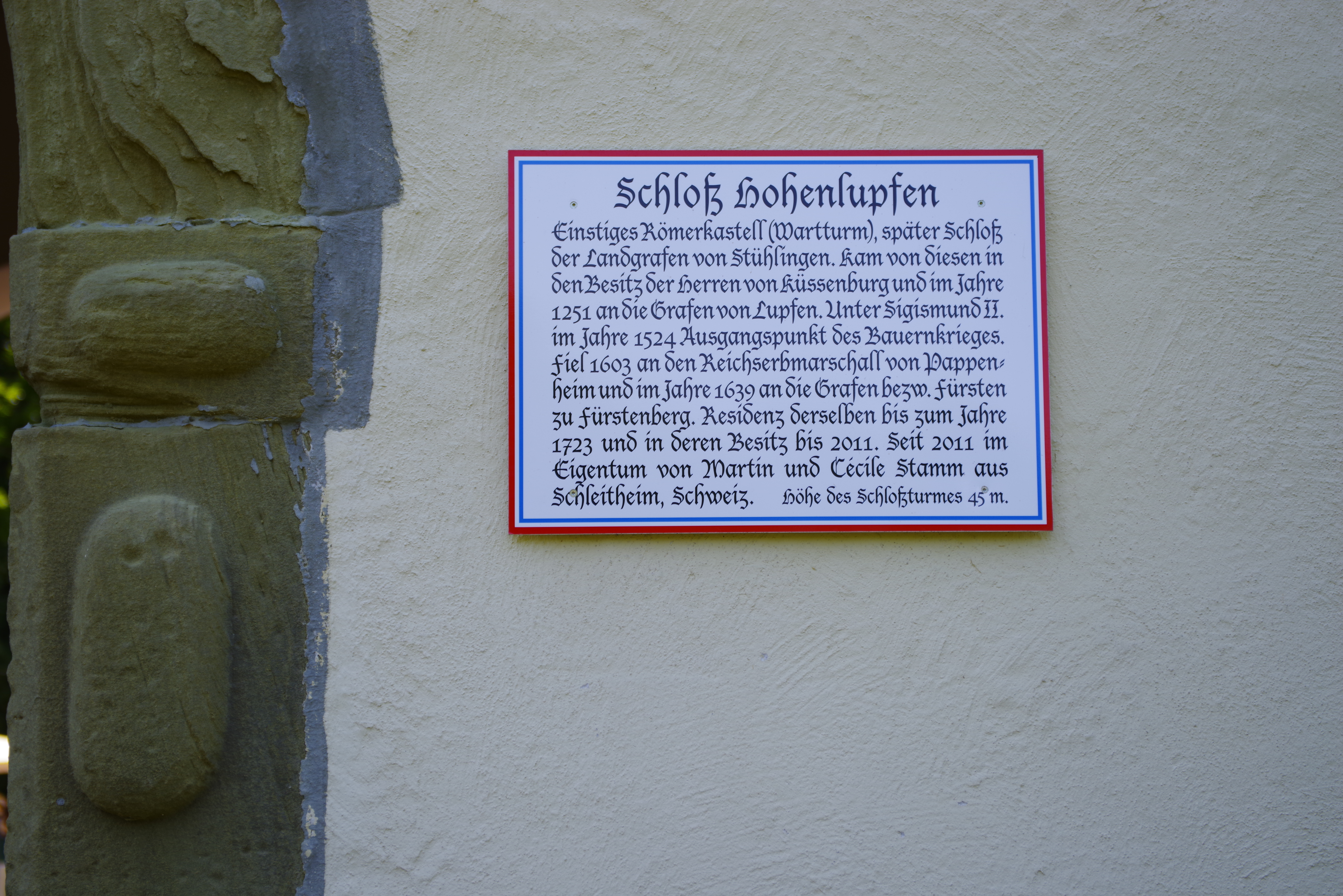 Tafel der neuen Besitzerfamilie am Eingang zum Schloss Hohenlupfen